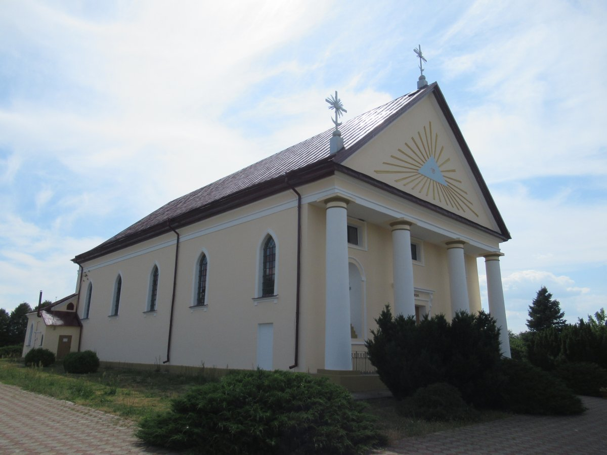 Касцёл Найсвяцейшай Дзевы Марыі і Святога Яна Непамука ў Вялікіх Эйсмантах